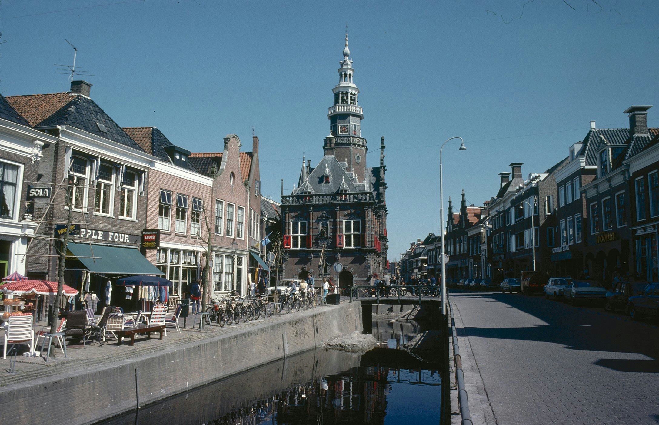 RAADHUIS: Exterieur OVERZICHT